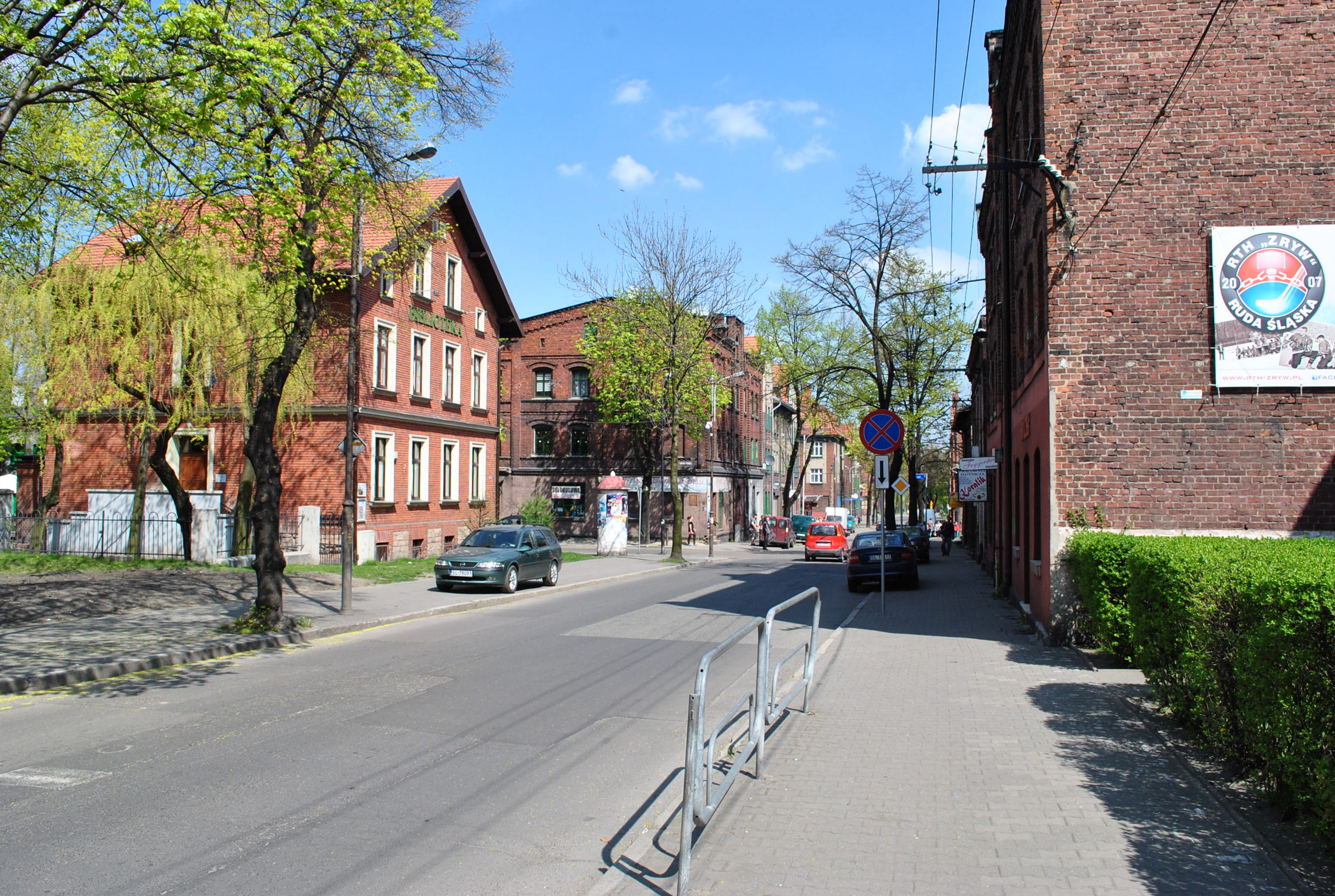 Ruda Śląska - Orzegów. Ulica kard. Augusta Hlonda